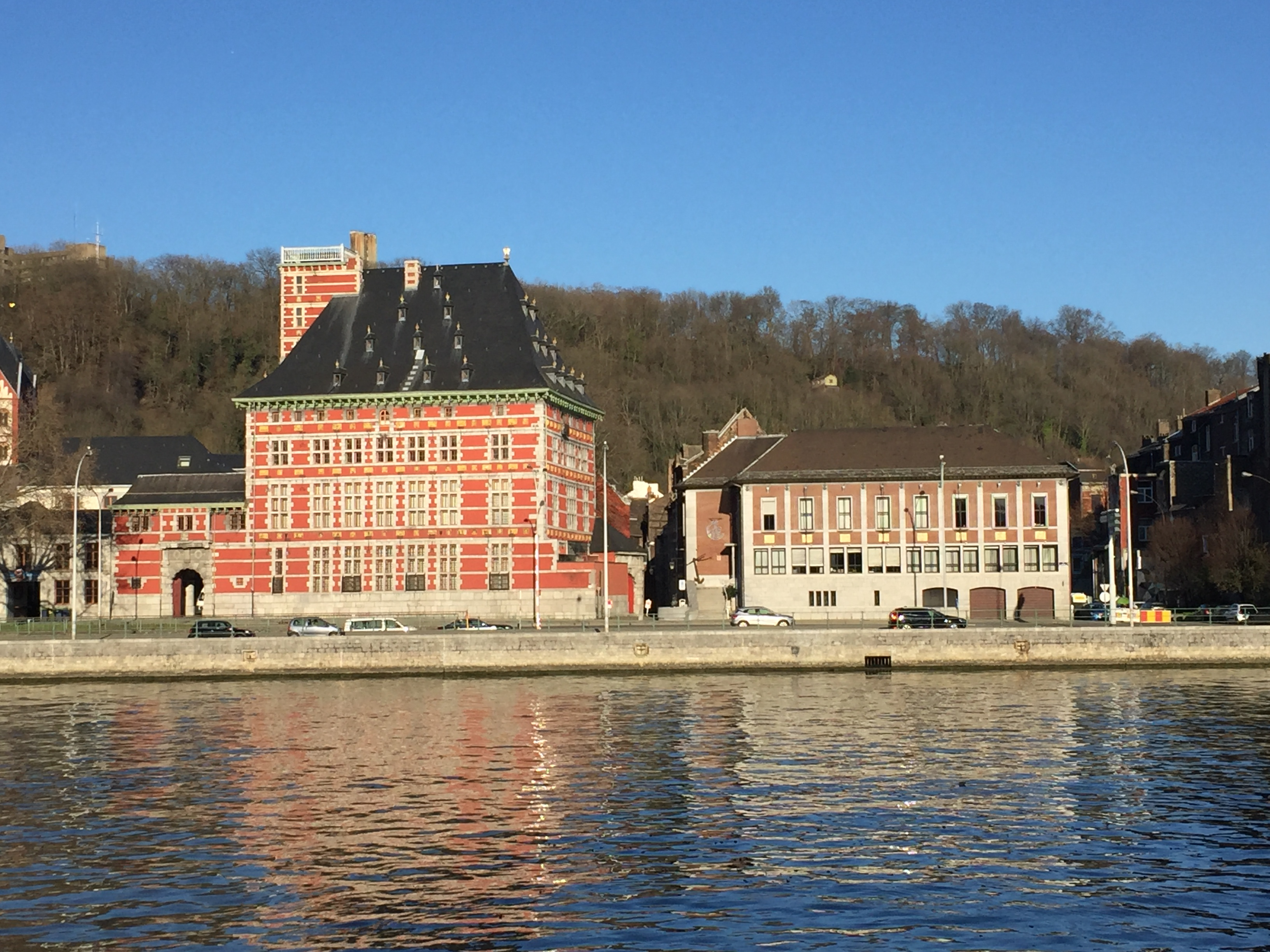 photo vers le bâtiment depuis la Meuse